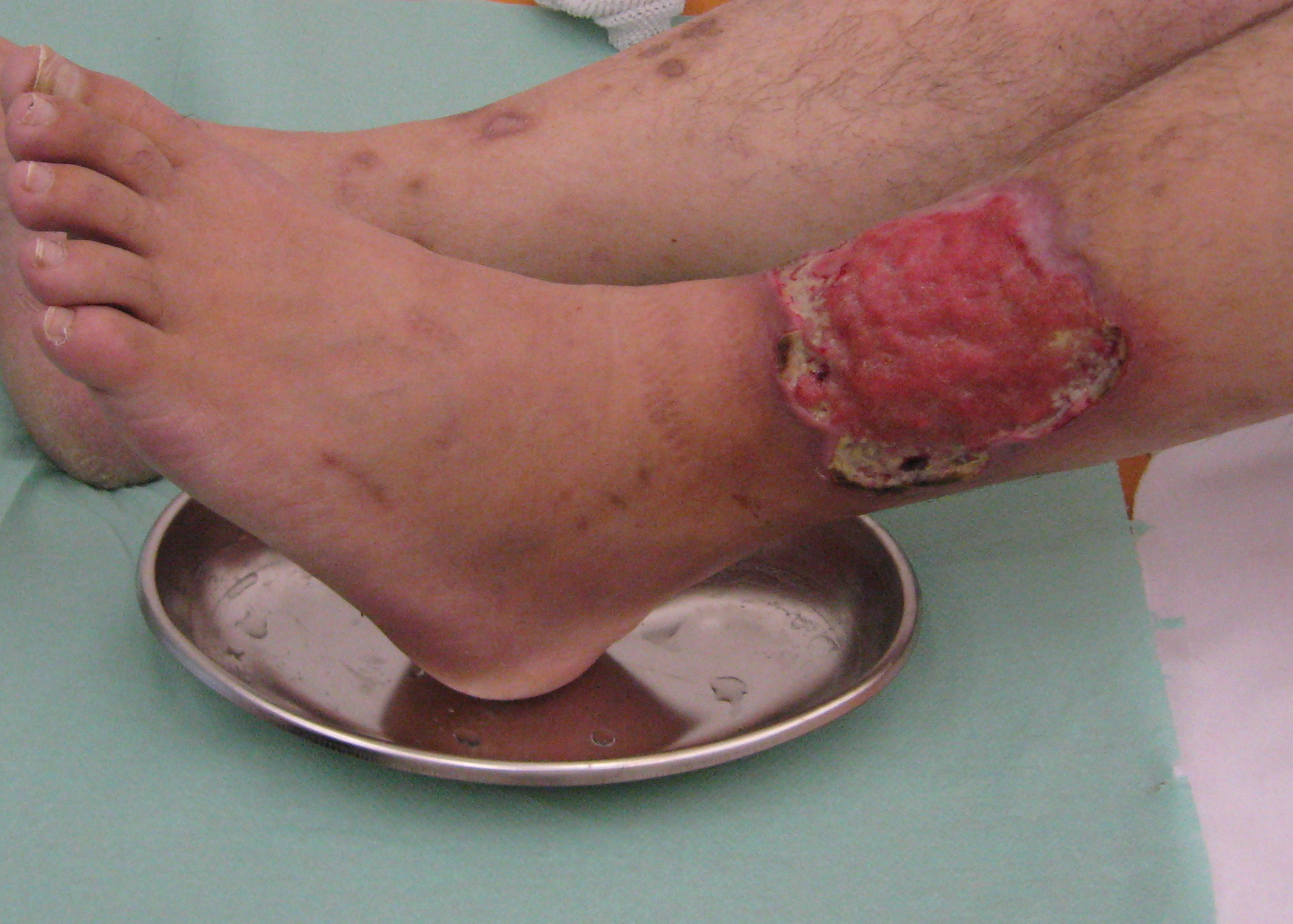 Ulcus cruris art.